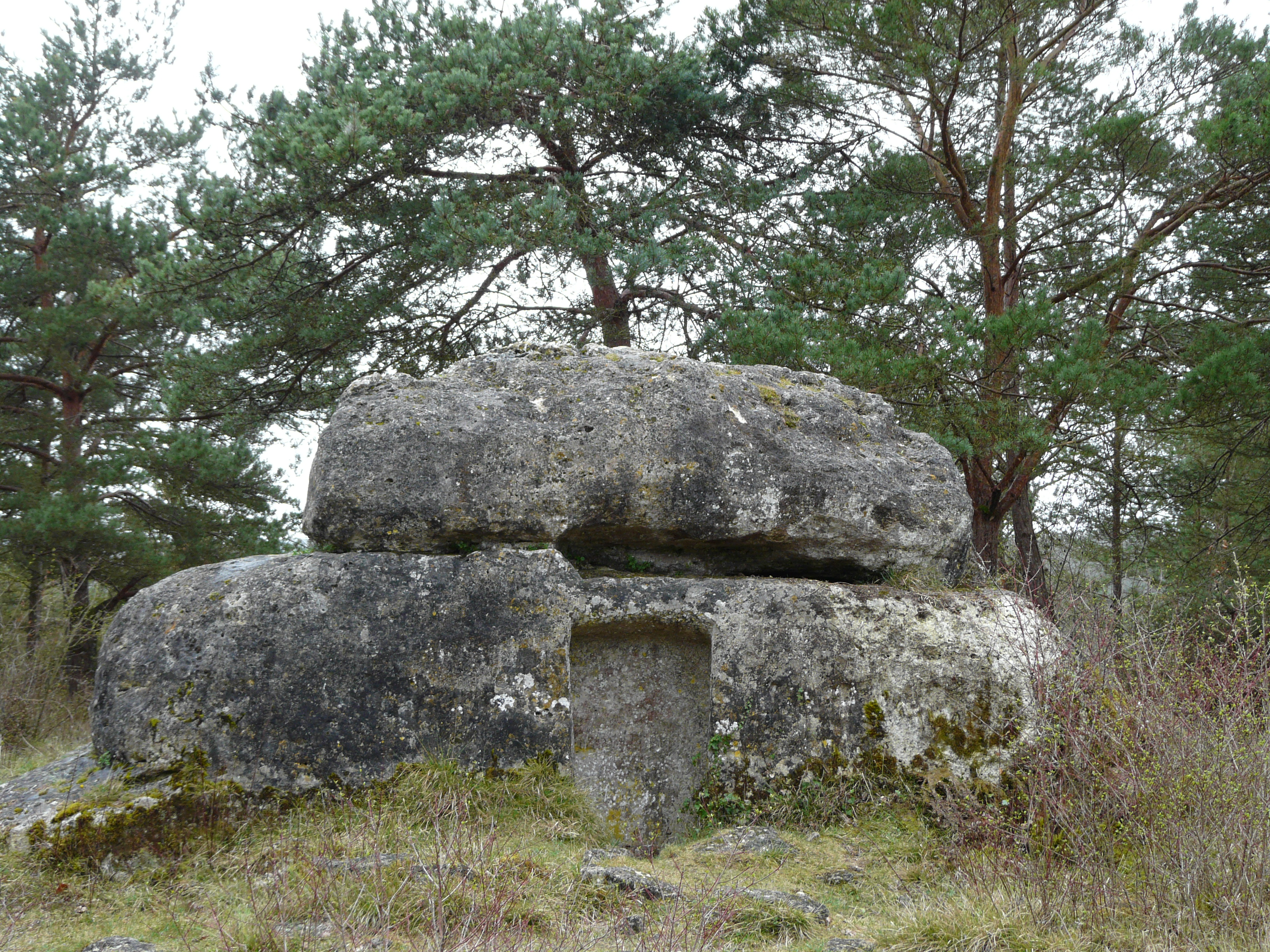 La Peyre d'Ermale, Paussac-et-Saint-Vivien, Dordogne, France. En bas, au centre, une cavité artificielle creusée dans la roche.